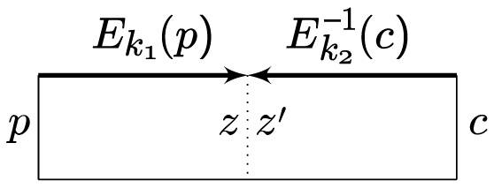 תיאור התקפת נפגש באמצע